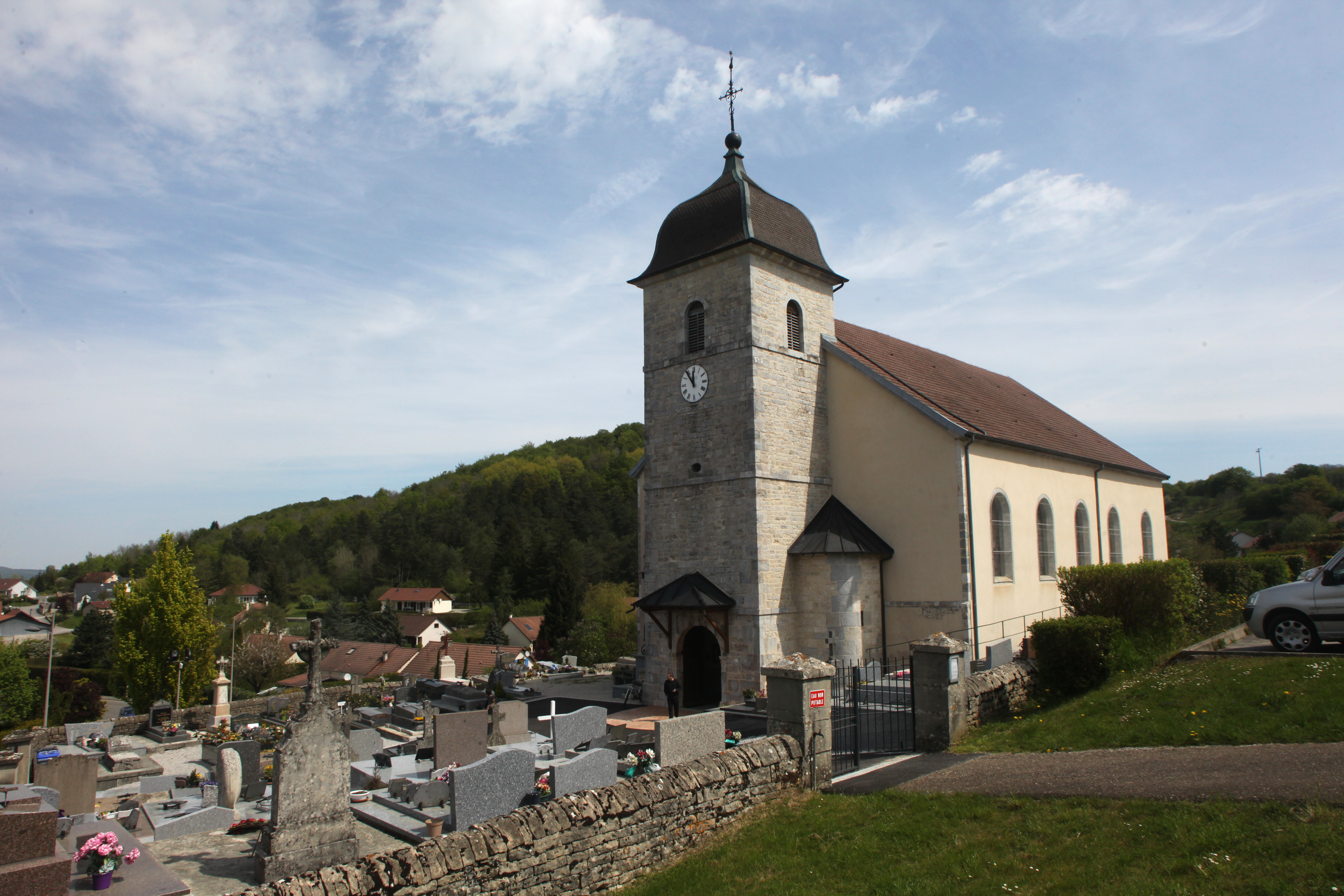 Église de Tarcenay (Doubs).